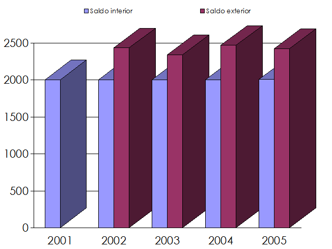 Variaciones residenciales en Valladolid